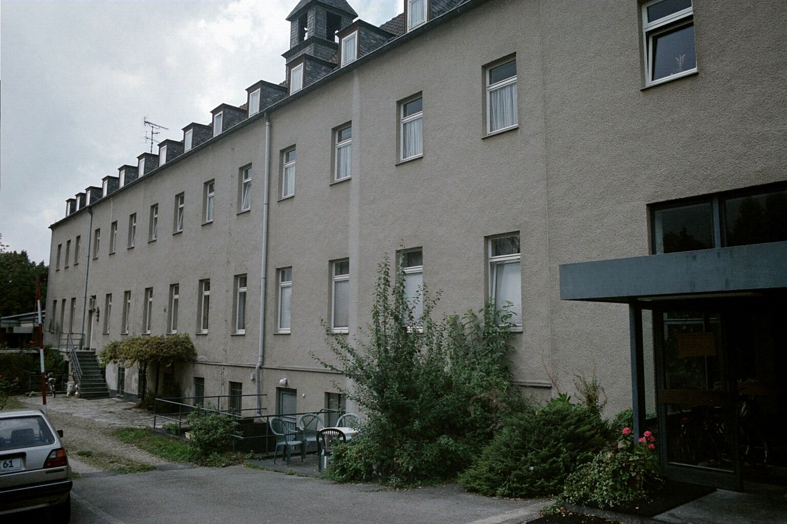 Rückseite des ehemaligen Dürener Eucharistinerklosterbaus in der Kölnstraße